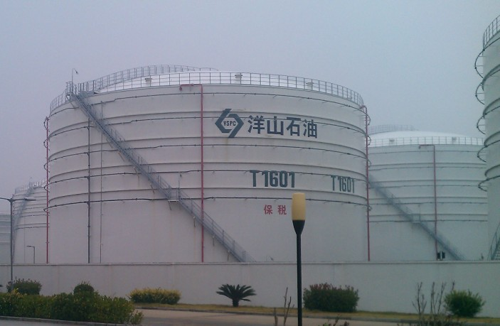 洋山石油用于储存轻质油品的内浮顶油罐